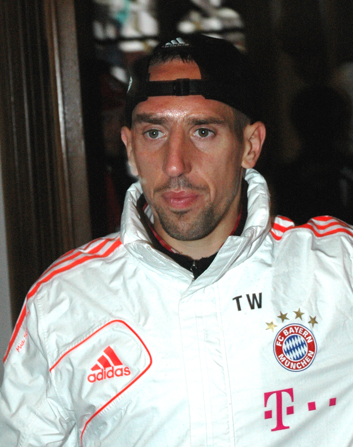 Franck Ribéry bei der "Triple-Feier" im Münchner Rathaus 2013